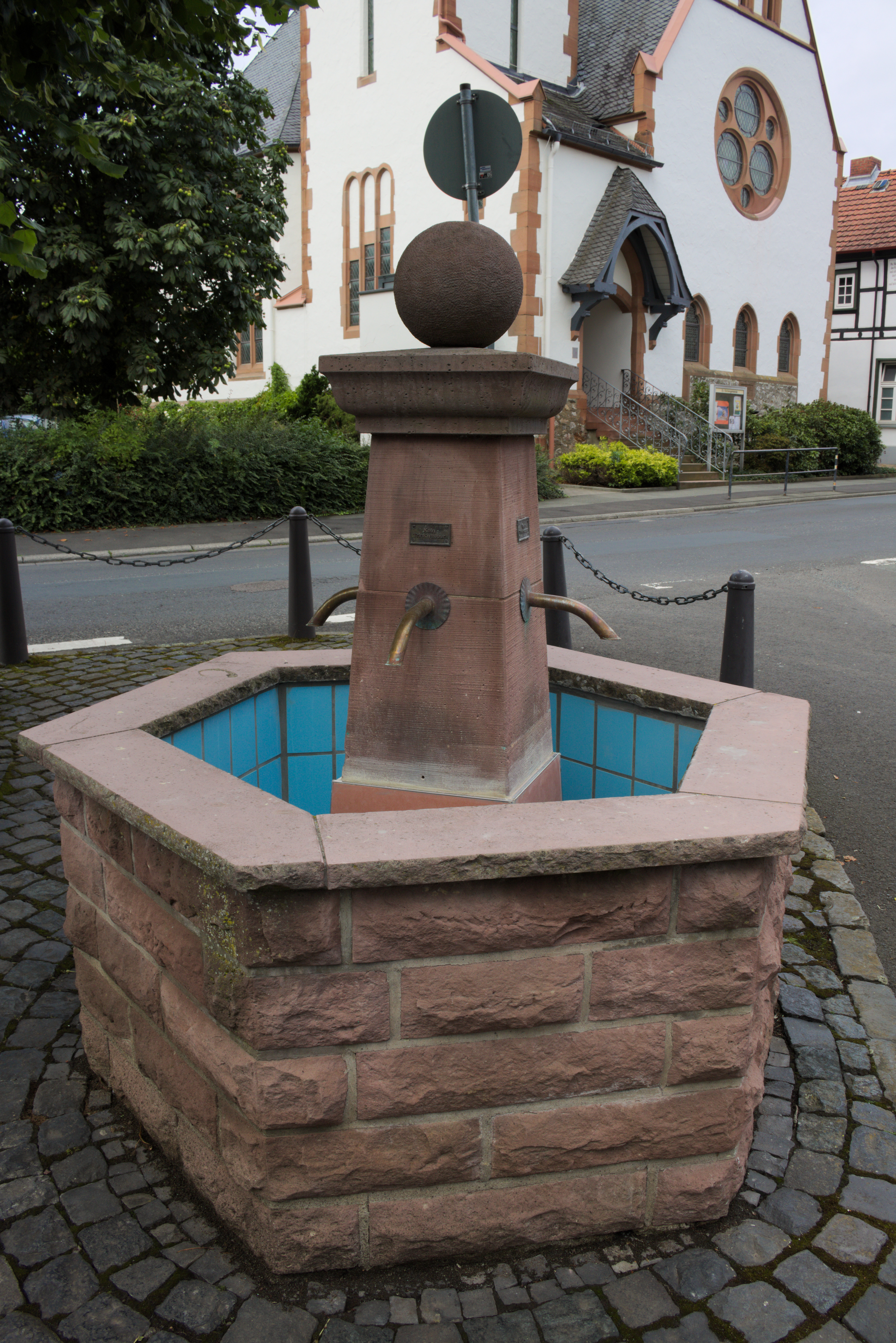 Der Brunnen im Dorfkern in Fellingshausen, direkt vor der Kirche, nachdem Fliesen im Brunnen angebracht wurden. (Stand: 18.08.2015)